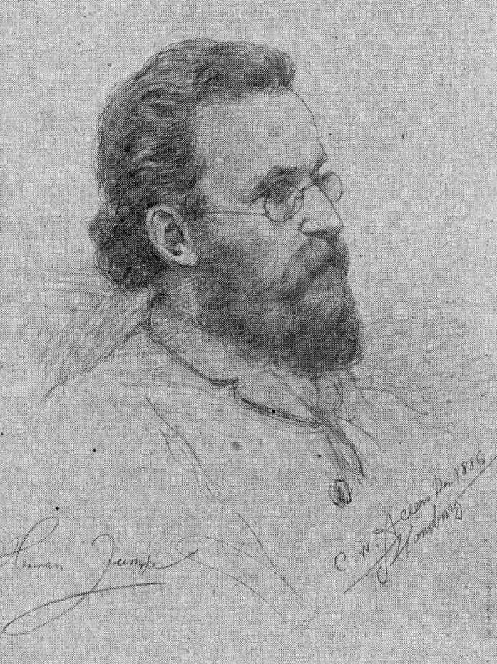 Der Dirigent Hermann Zumpe. Ortsangabe: Hamburg.